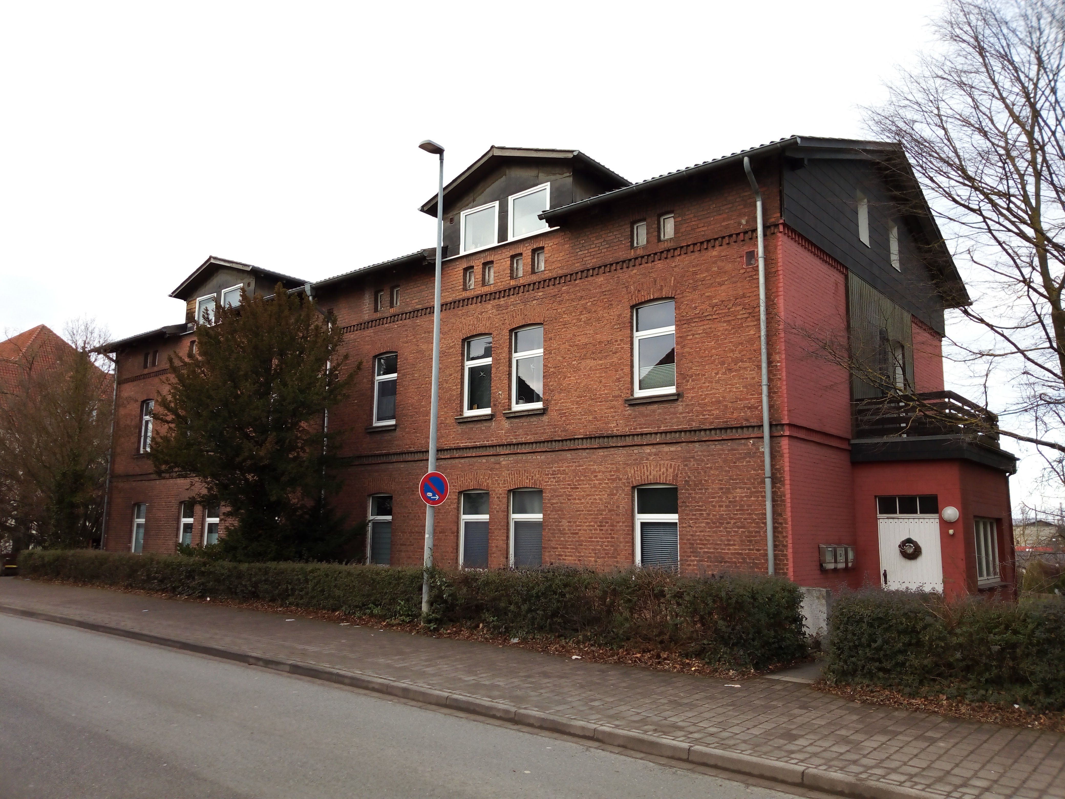 Ehemaliges Bahnbetriebswerk Warburg, Lokschuppen